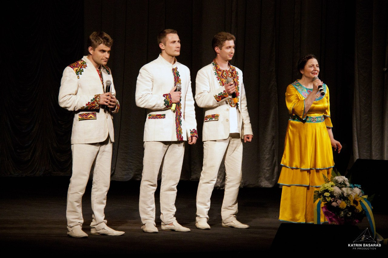 Спільний концерт гурту Тріода і Ніни Матвієнко у м. Львів.